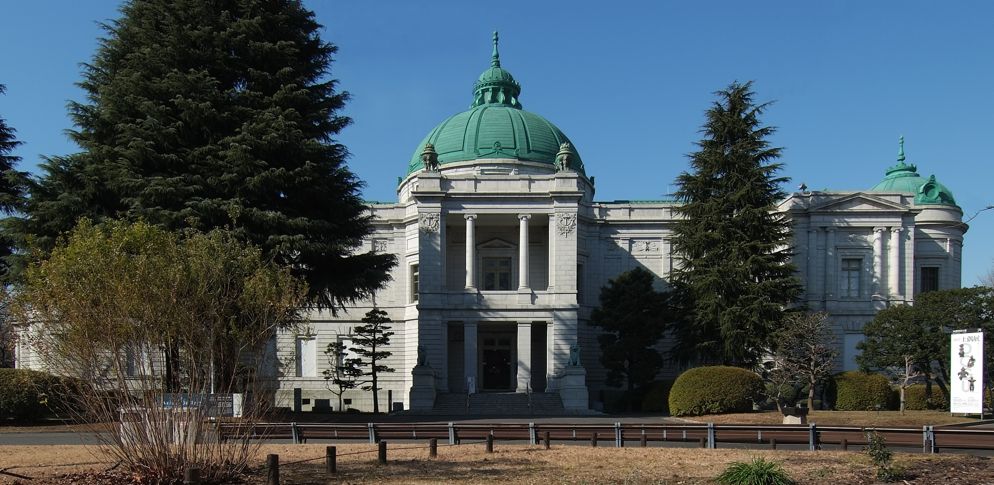 Hyokeikan of Tokyo National Museum, Taito-ku Tokyo Japan, designed by Tokuma Katayama in 1909.